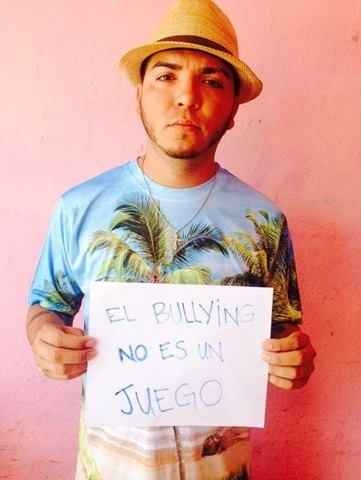 Es contra en bullying